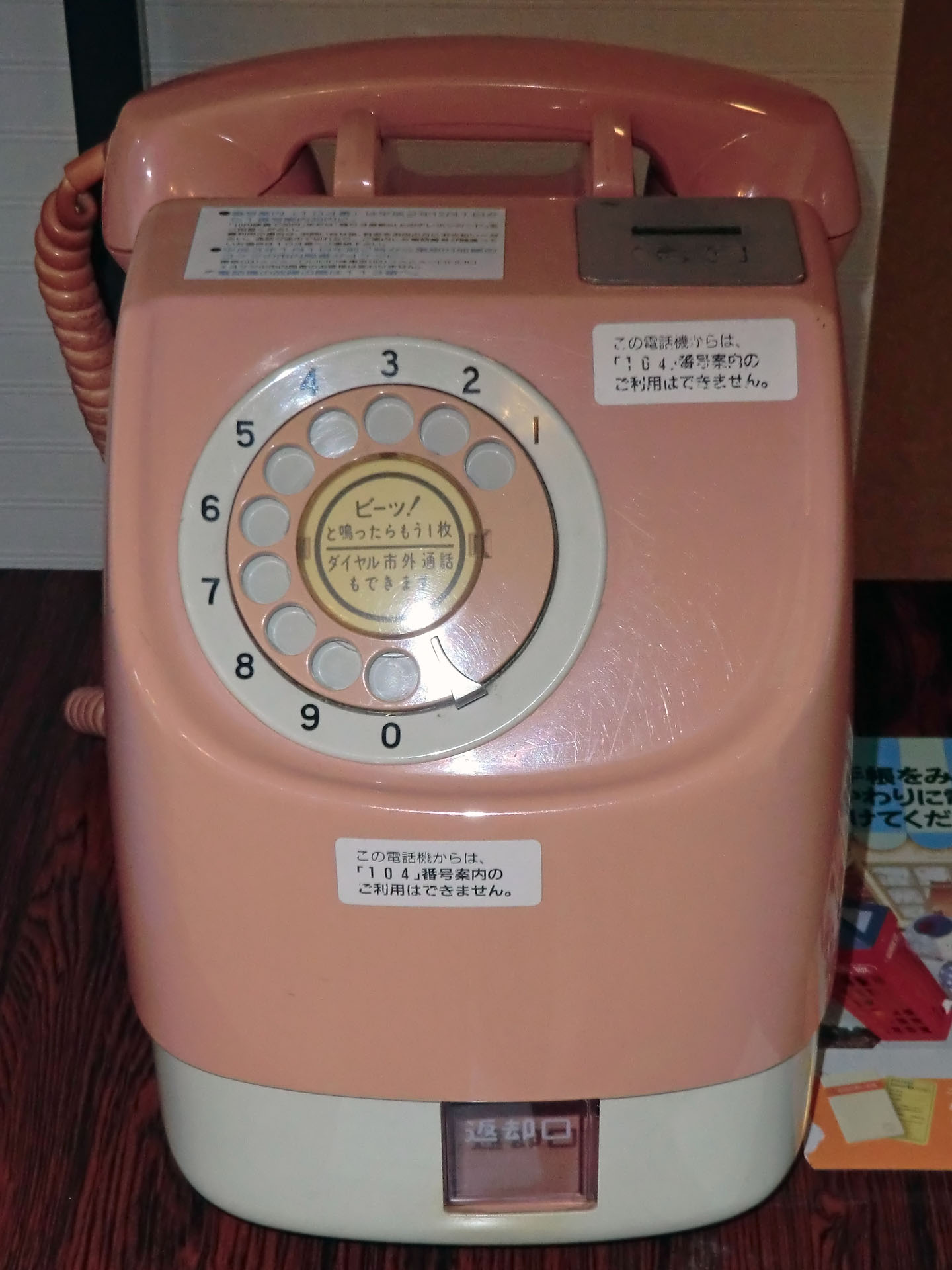 上山市老人福祉センターにて 675S-A2型ダイヤル式ピンク公衆電話機